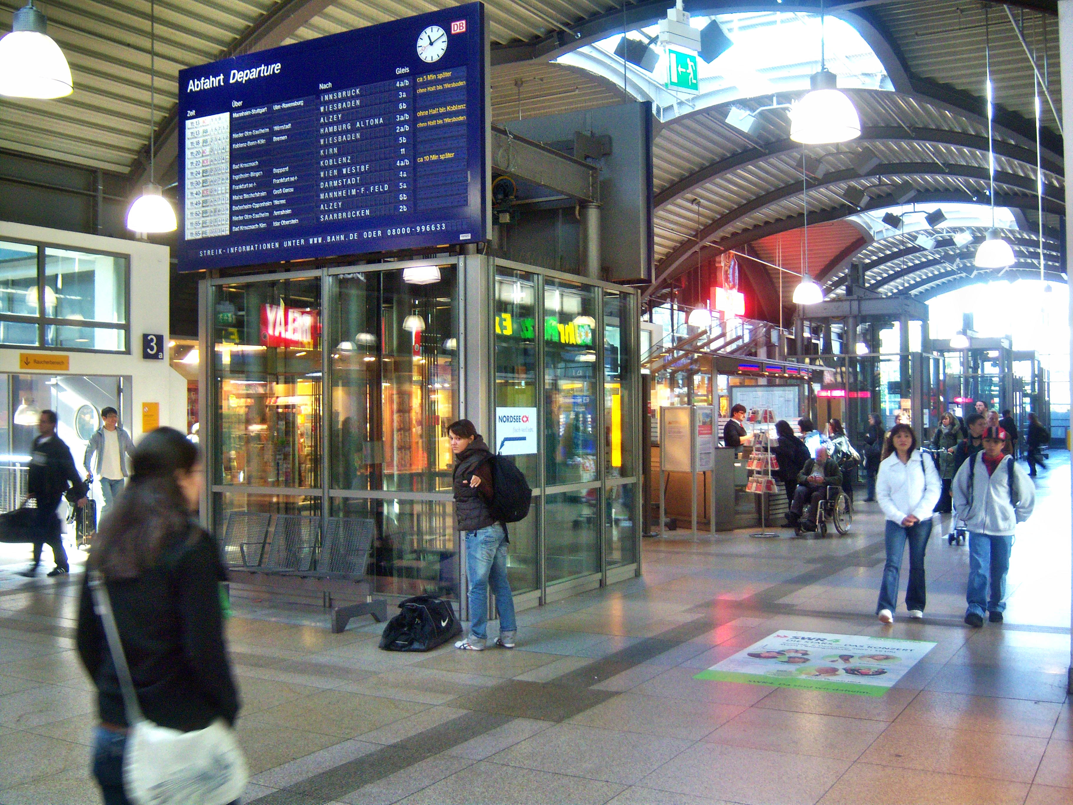 Hochsteg des Mainzer Hauptbahnhofes